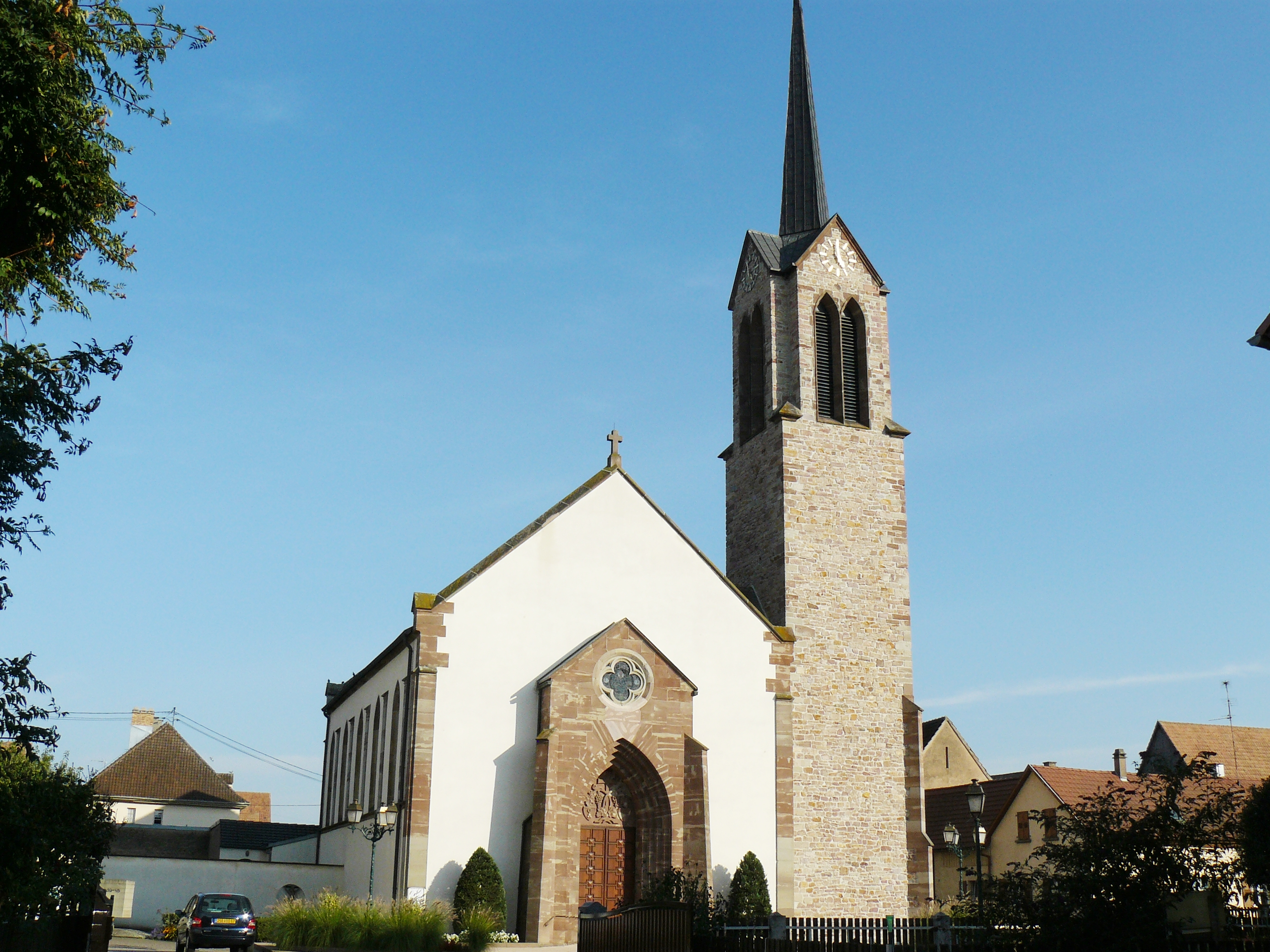 Église Saint-Nicolas (1871)